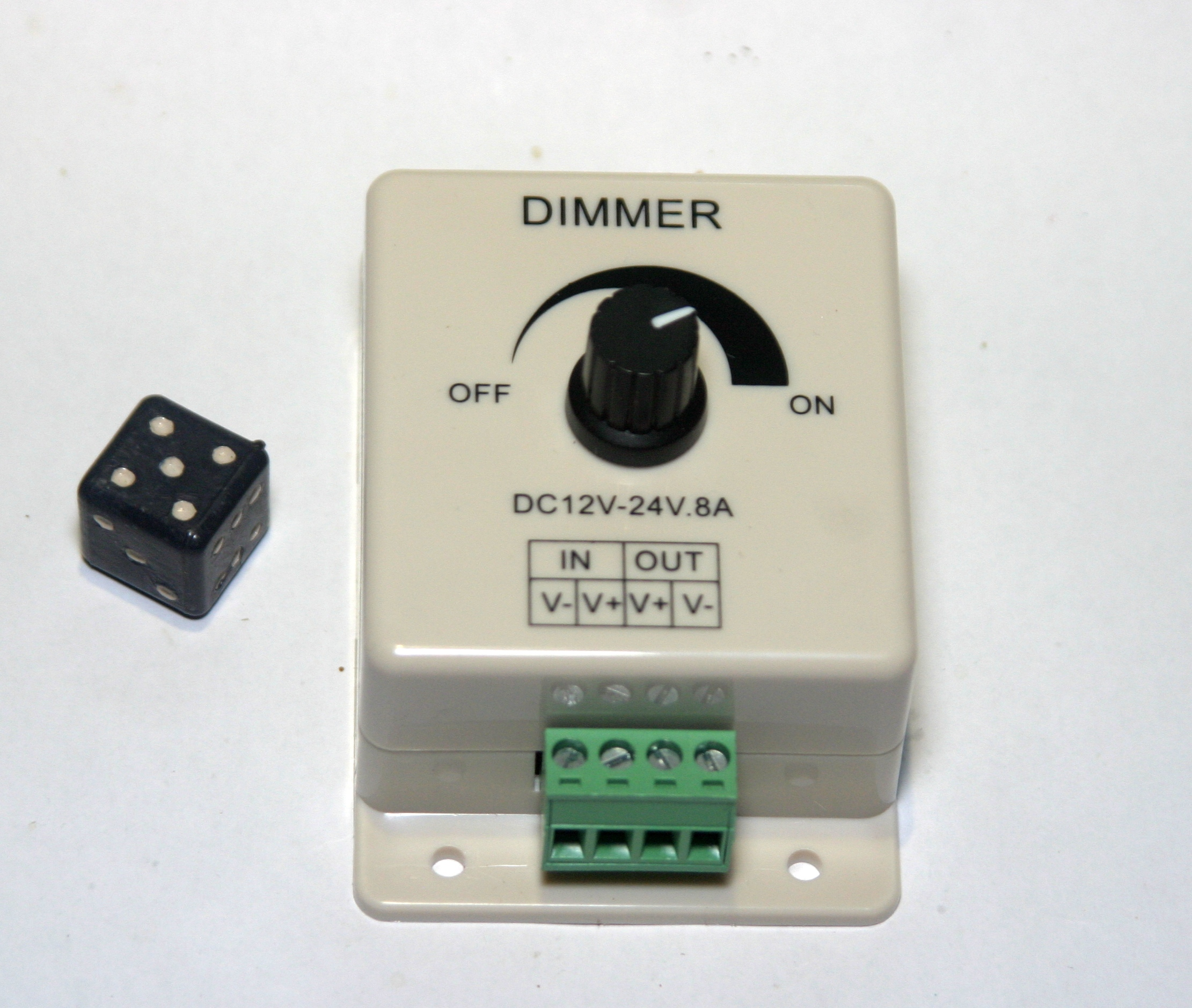 Диммер 12V 8A для управления яркостью светодиодов и ламп накаливания.